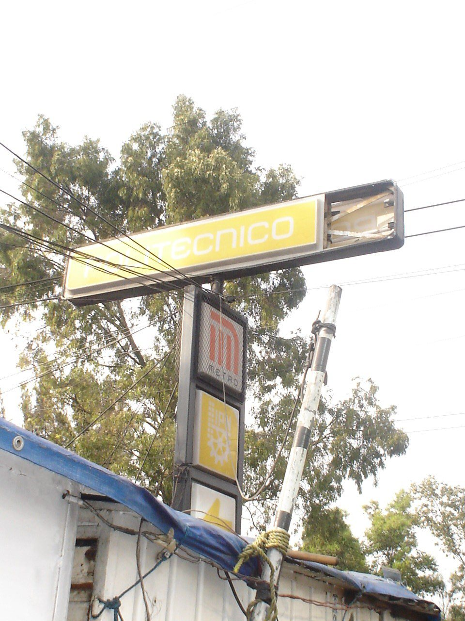 ESTACION POLITECNICO